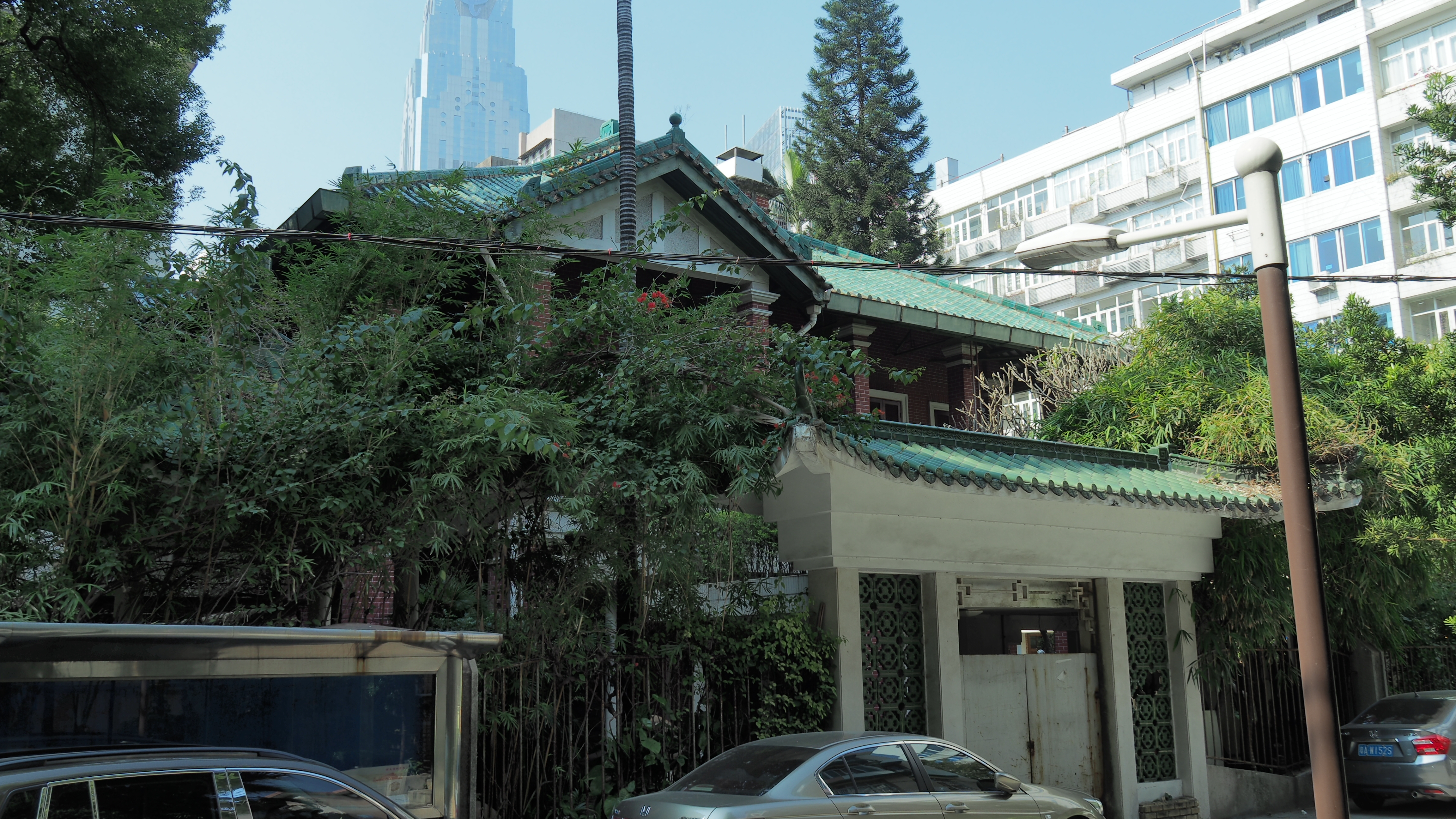 中文（中国大陆）: 位于广东省广州市越秀区中山一路小东园6号。